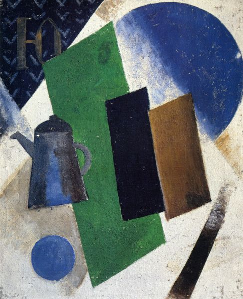 Алексей Моргунов. Композиция с буквой "Ю". Середина 1910-х. Холст, масло, 65 х 54. Собрание Государственного Русского музея.